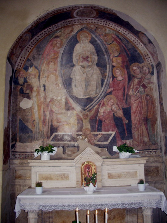 Affresco rinascimentale di scuola senese raffigurante l'Assunzione della Vergine, chiesa dei Santi Stefano e Lorenzo Montepescali (GR)